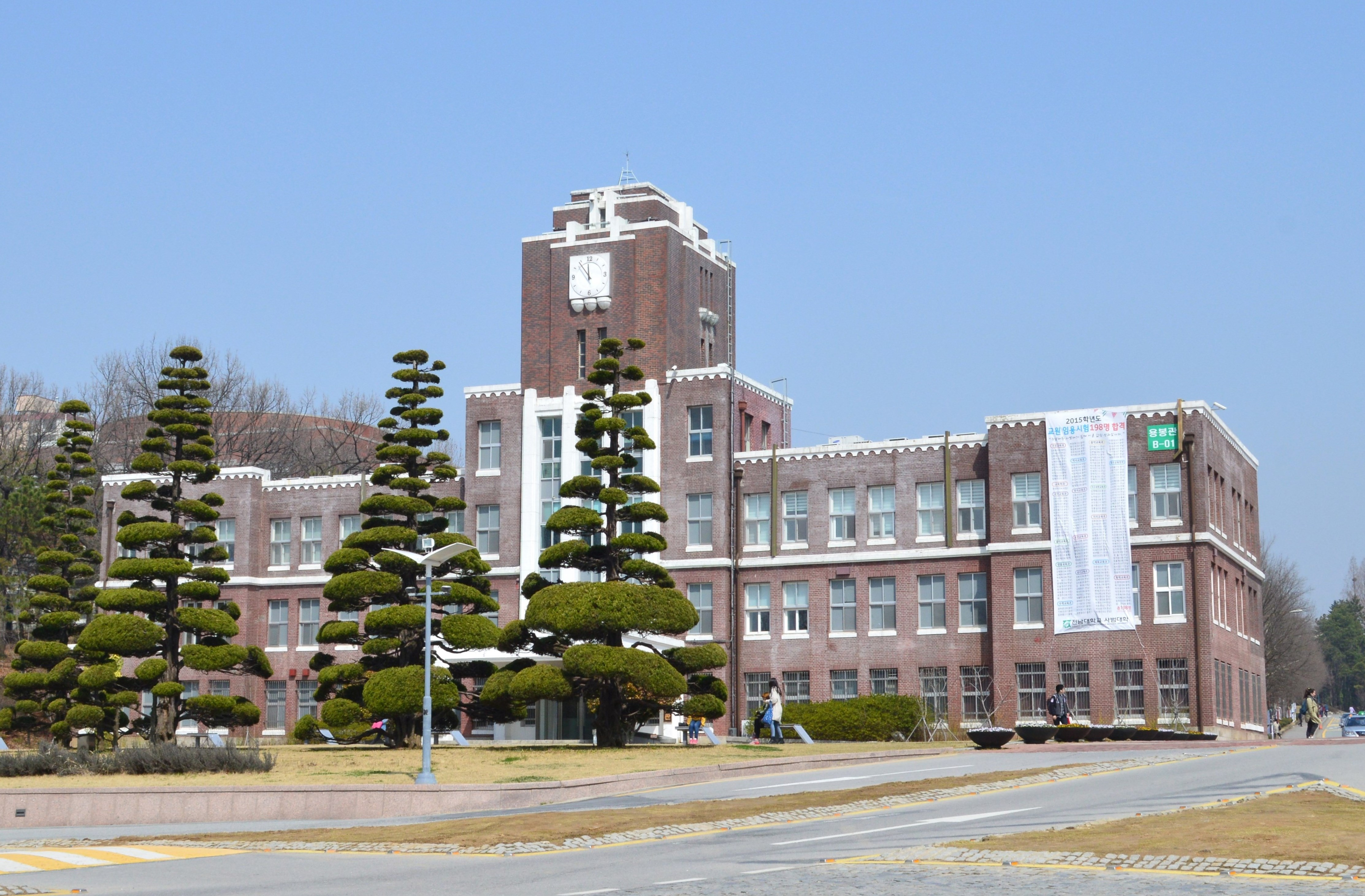 全南大学 5.18記念館